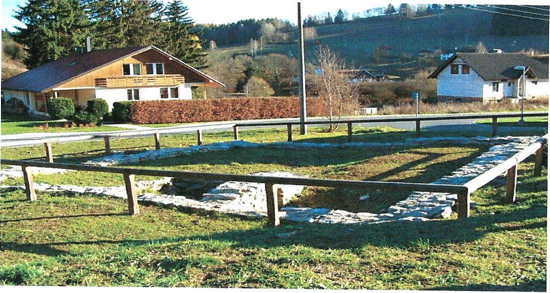 Středověká úpravna zlatých rud (Kašperské Hory)